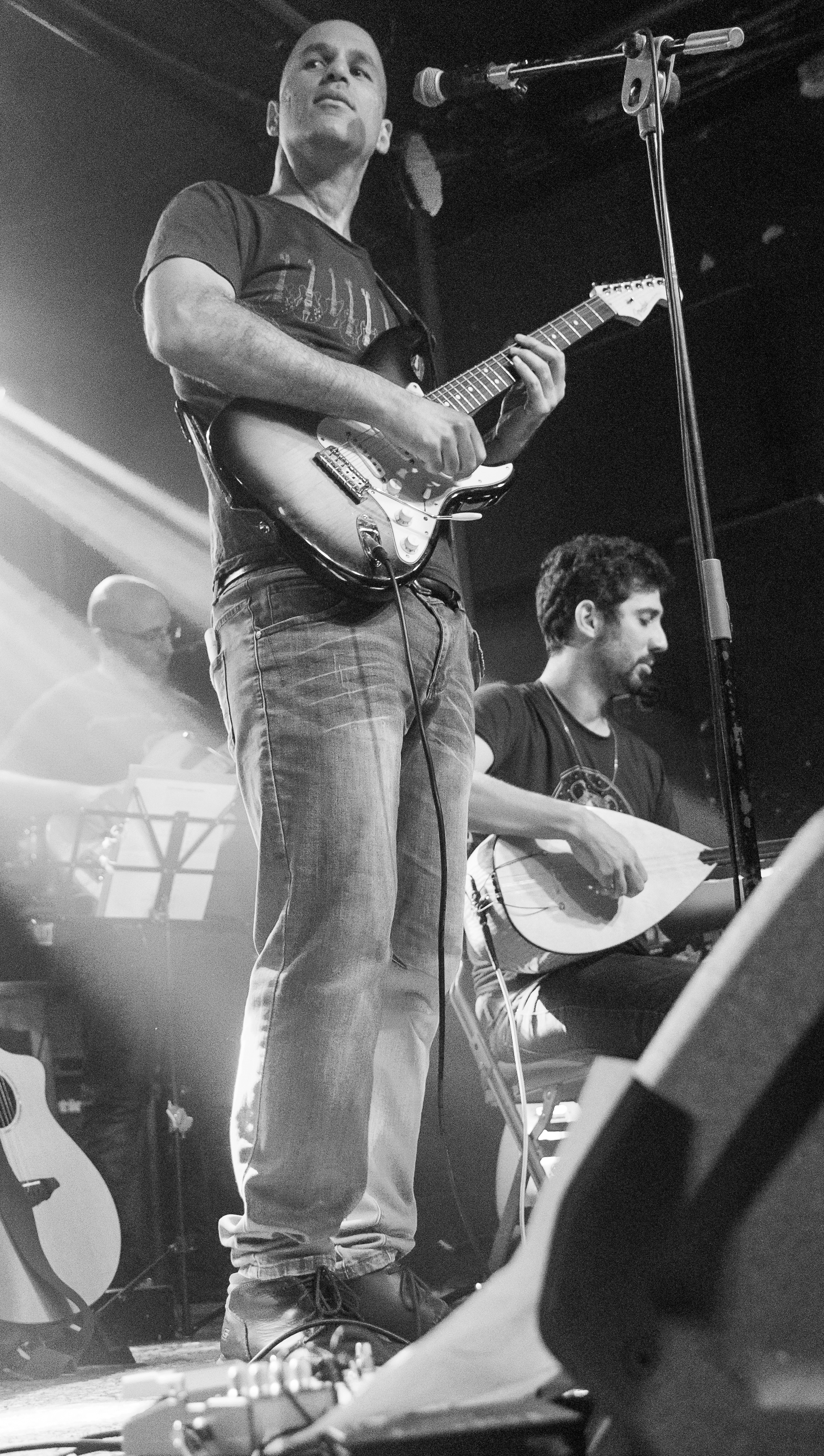 הזמר שחר כהן בהופעה בבר גיורא תל אביב - השקת האלבום 20 40